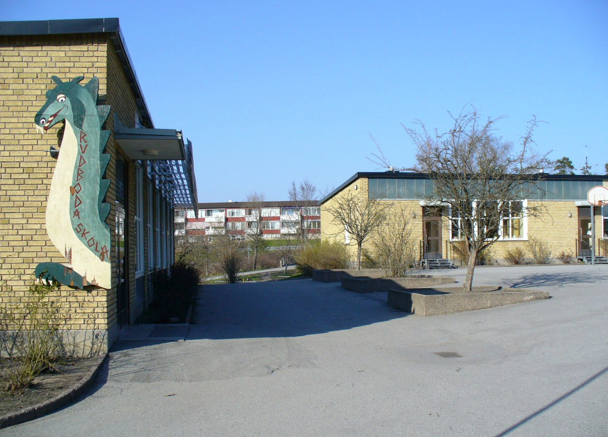 Rudboda school, Lidingö, Sweden